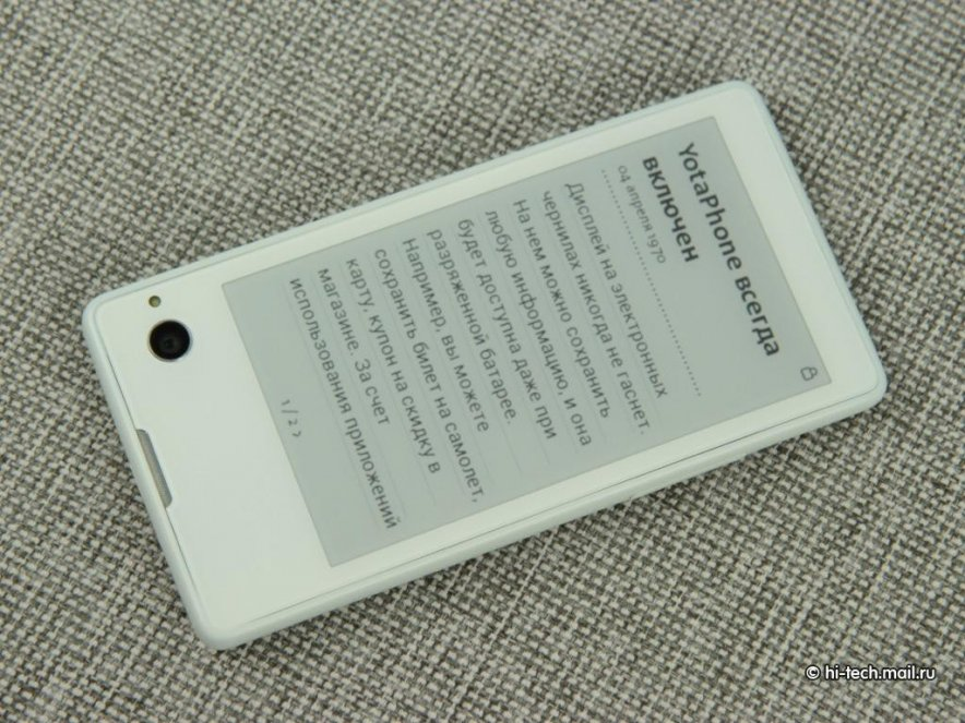 Электронные чернила на обратной стороне Йотафона